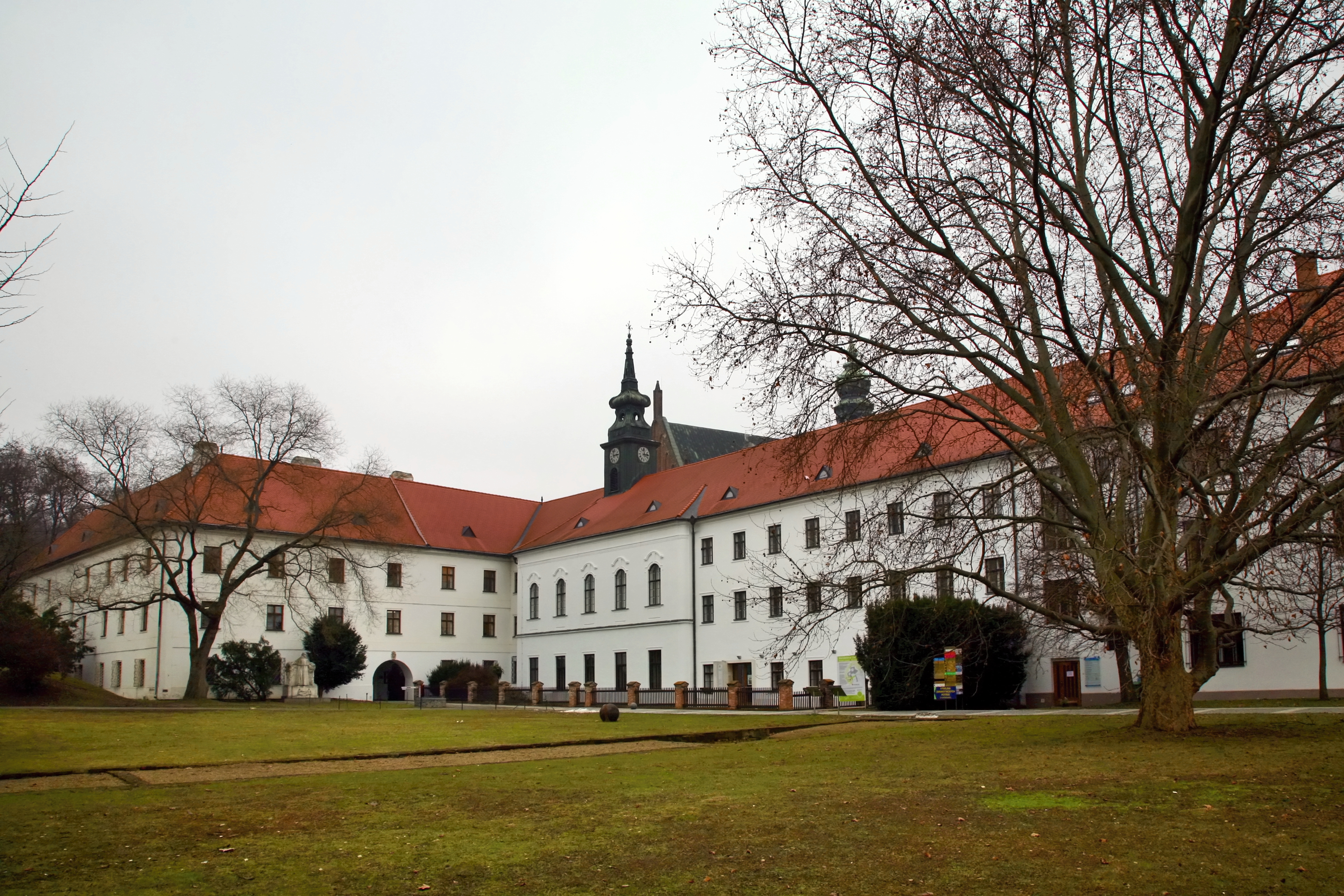 Pohled na Mendelovo muzeum a základy Mendelova skleníku